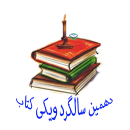 دهمین سالگرد ویکی کتاب